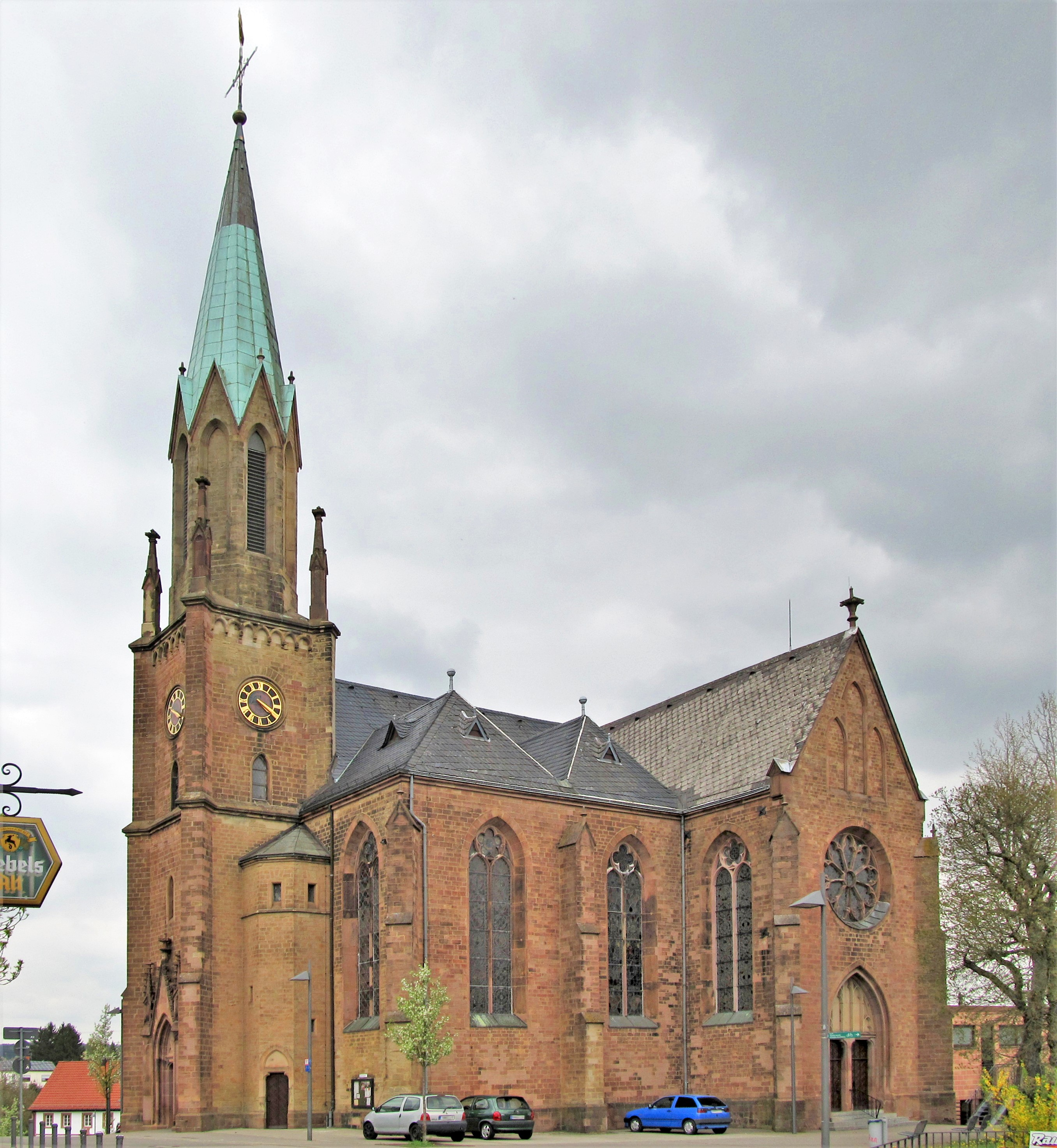 Die katholische Pfarrkirche St. Martin in Schiffweiler, Landkreis Neunkirchen, Saarland